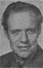 Erik Olof Holmberg